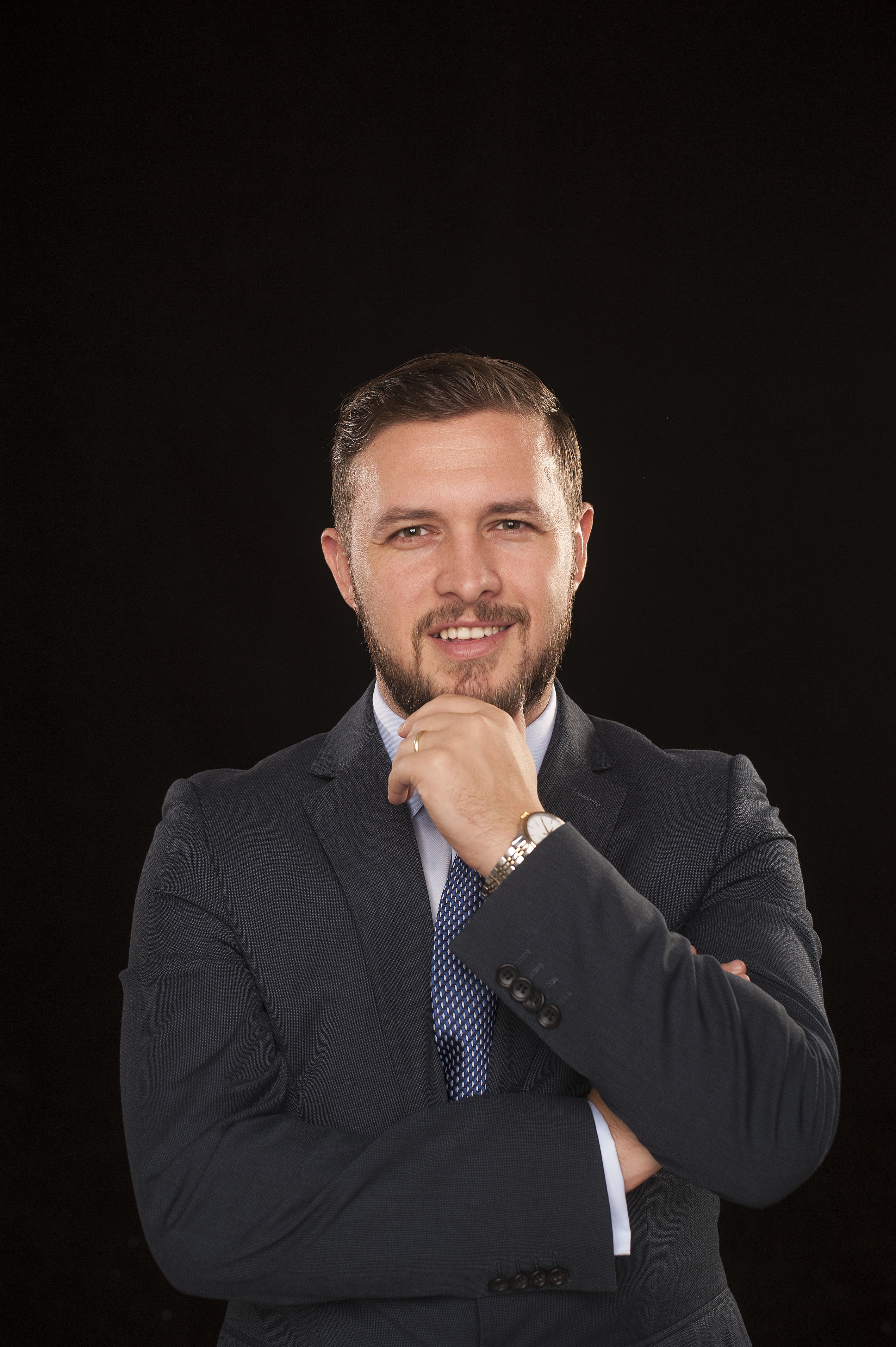 Portrait of Erion Malaj